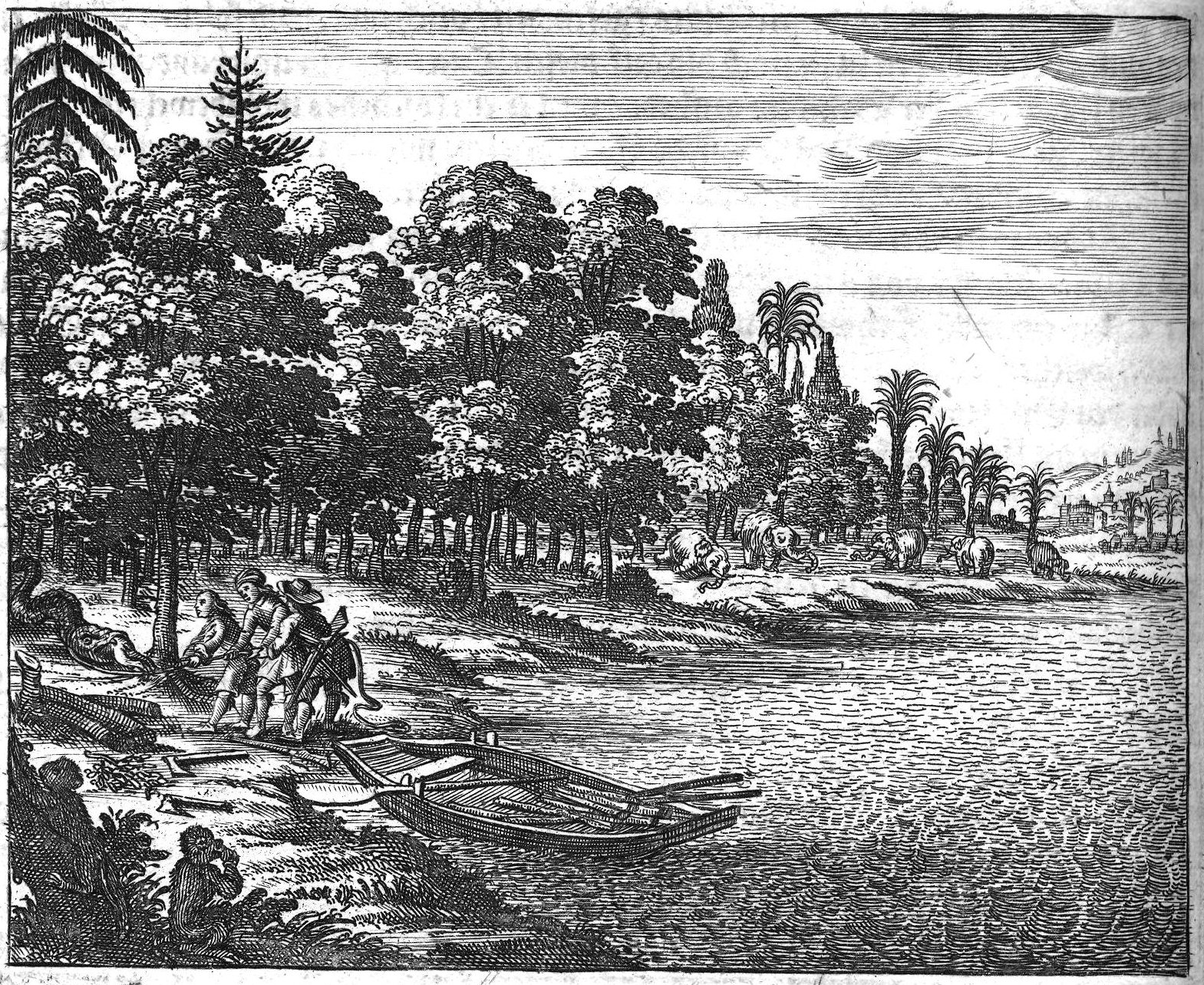 de: Dies ist ein Scan des historischen Buches: en: This is a scan of the historical document: Title: Ost-Indianische Funfzehen-Jährige Kriegs-Dienste